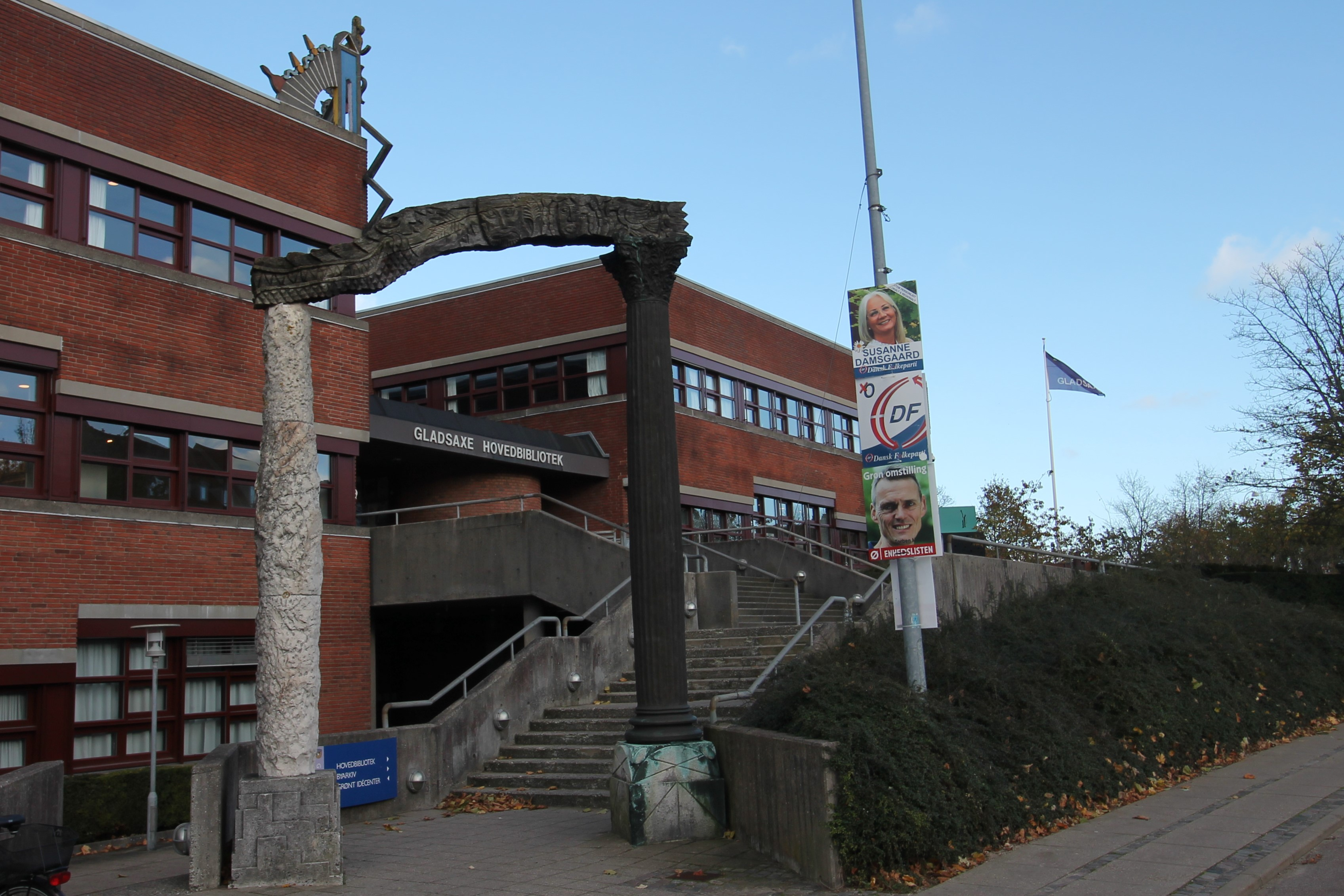 Gladsaxe Hovedbibliotek